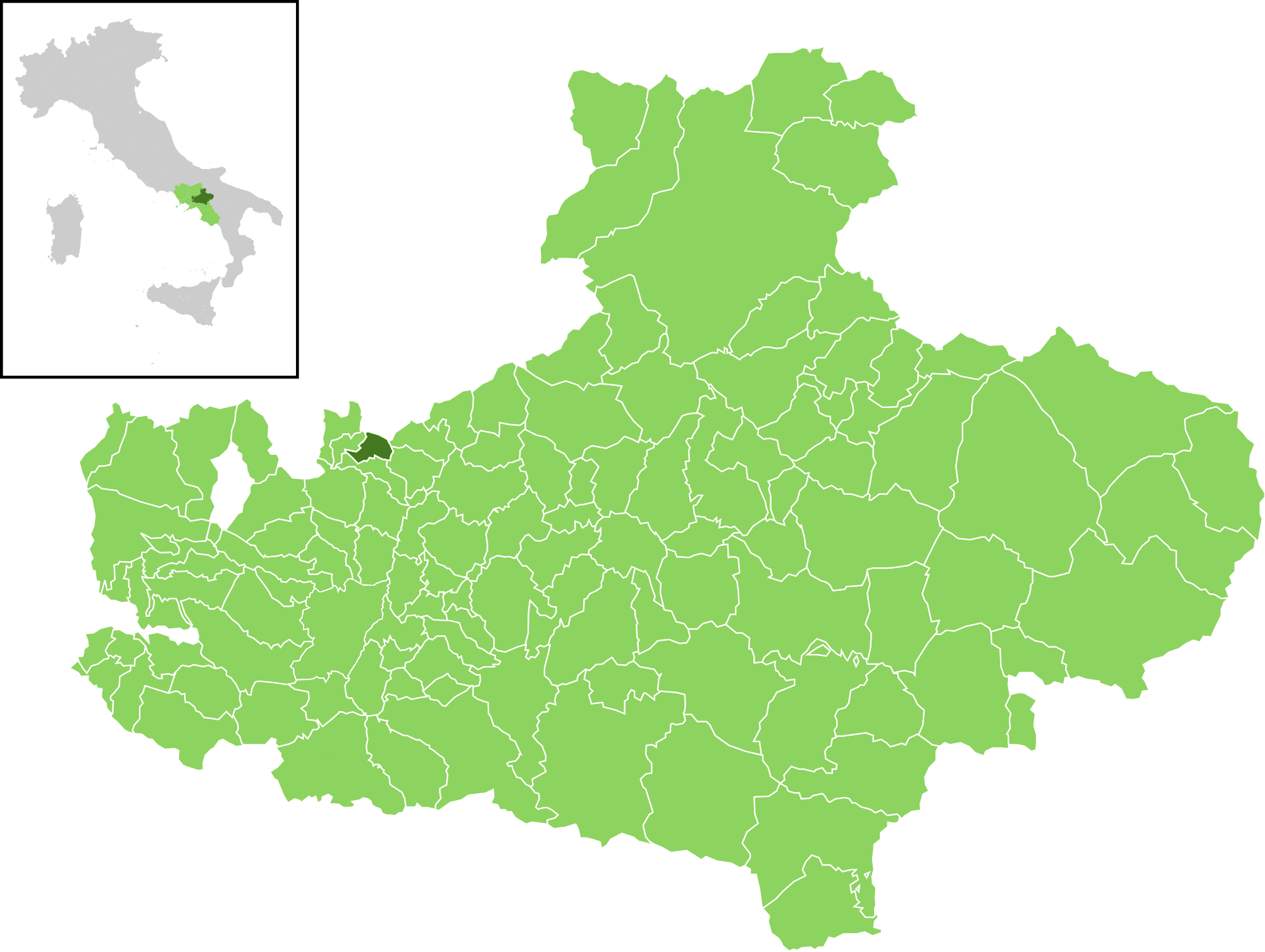 Posizione del comune all'interno della provincia di Avellino